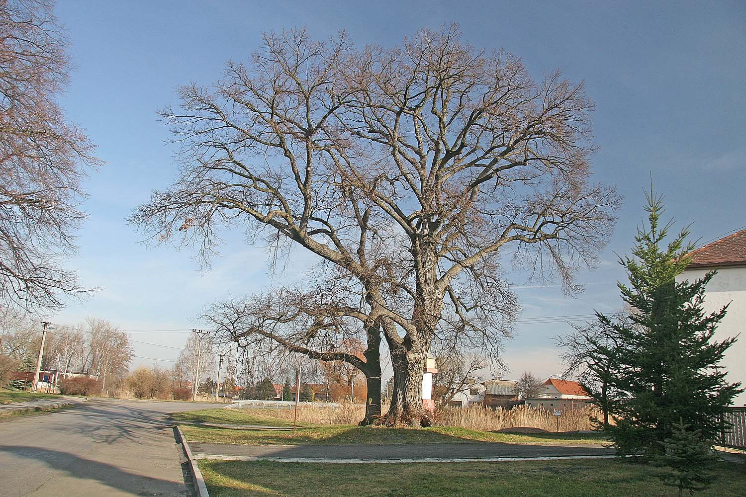 Veltruby - Památná lípa u Božích muk, district Kolín autor: Prazak date: 5. 2. 2007